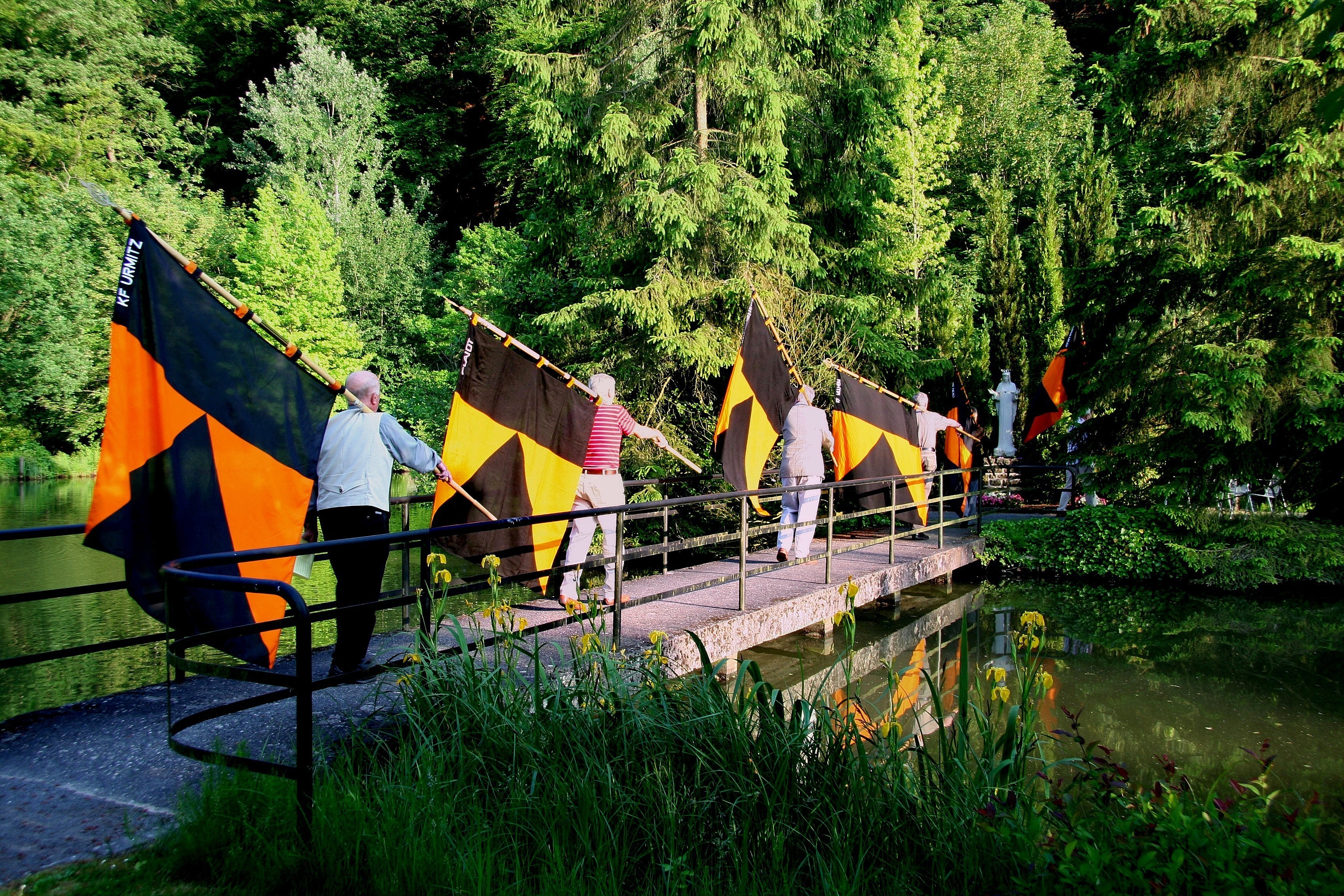 Prozession zur Marieninsel im Garten des ehemaligen Klosters Helgoland bei Mayen